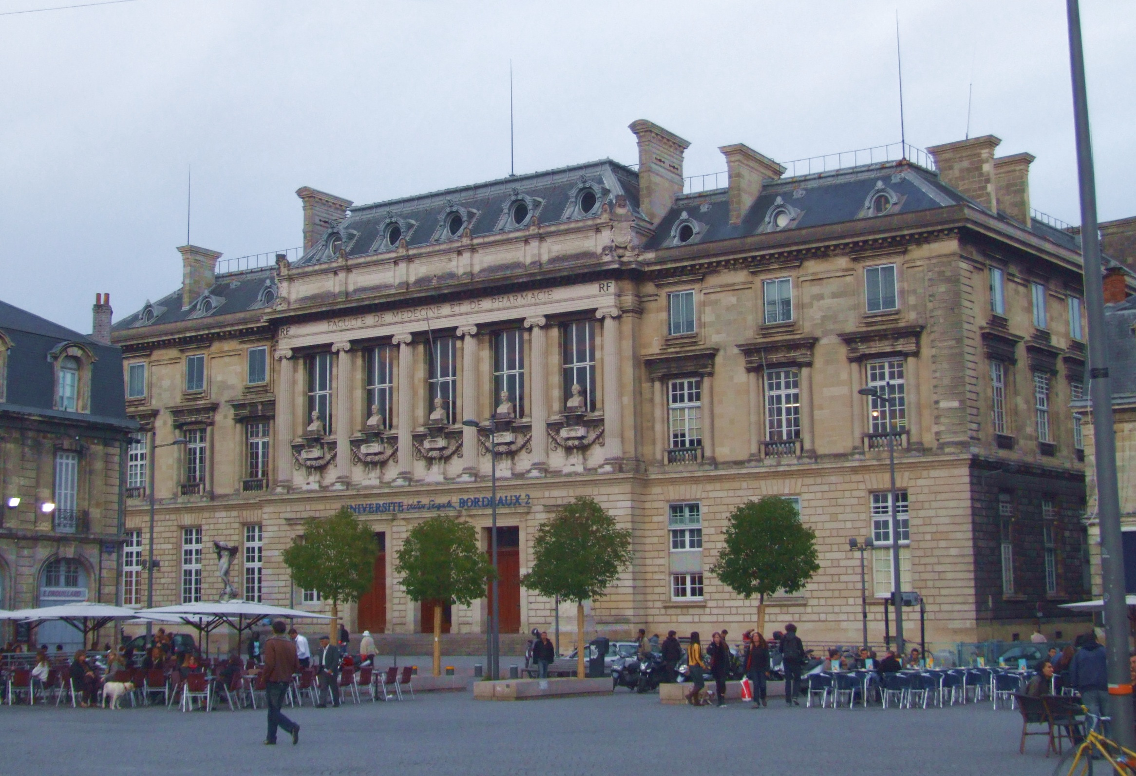 Bordeaux, Gironde, FRANCE